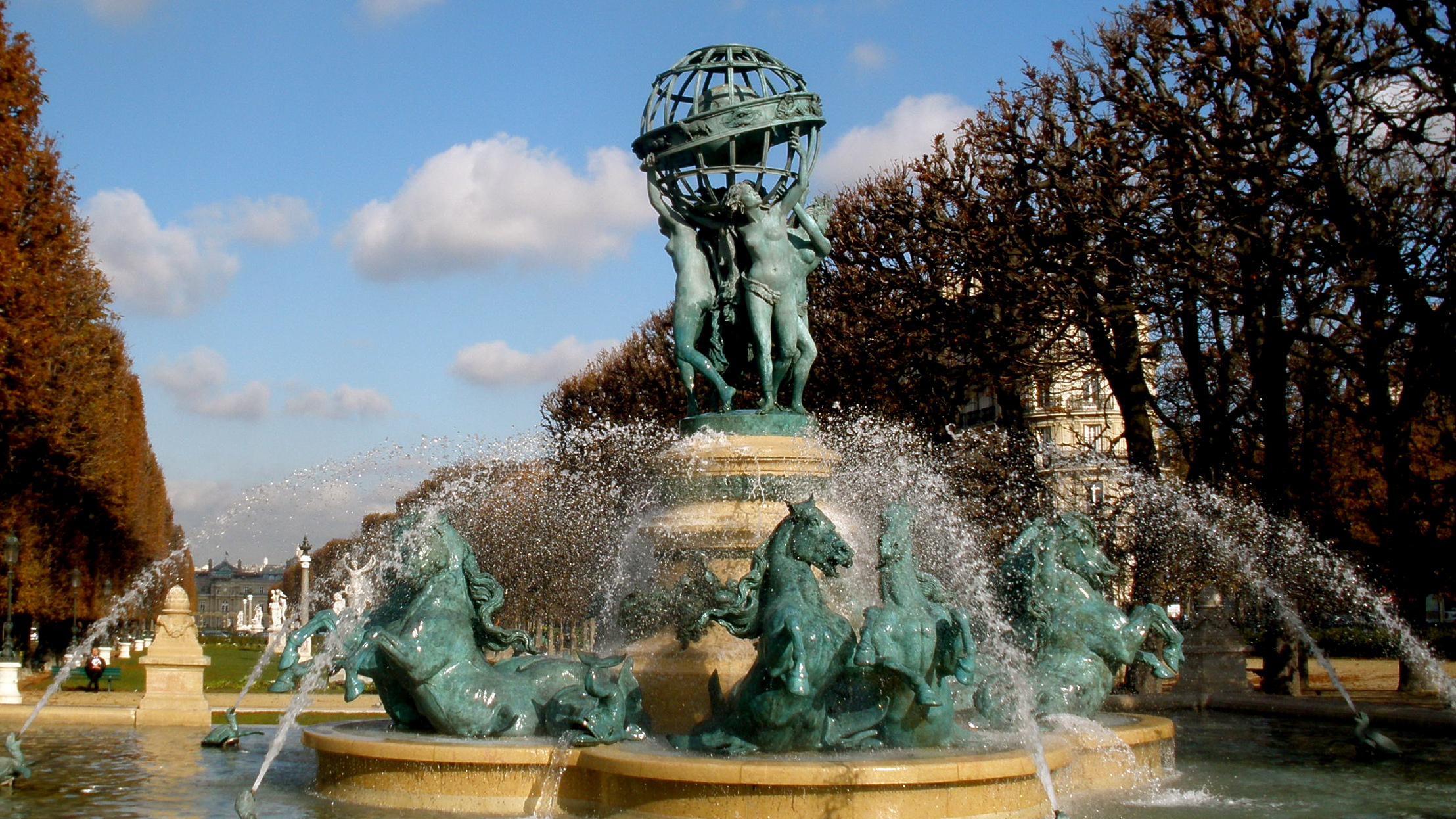 Fontaine des Quatre-Parties-du-Monde, Paris.